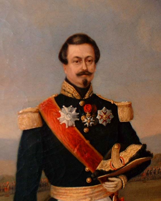 Auto-portrait du général Émile Perrodon.